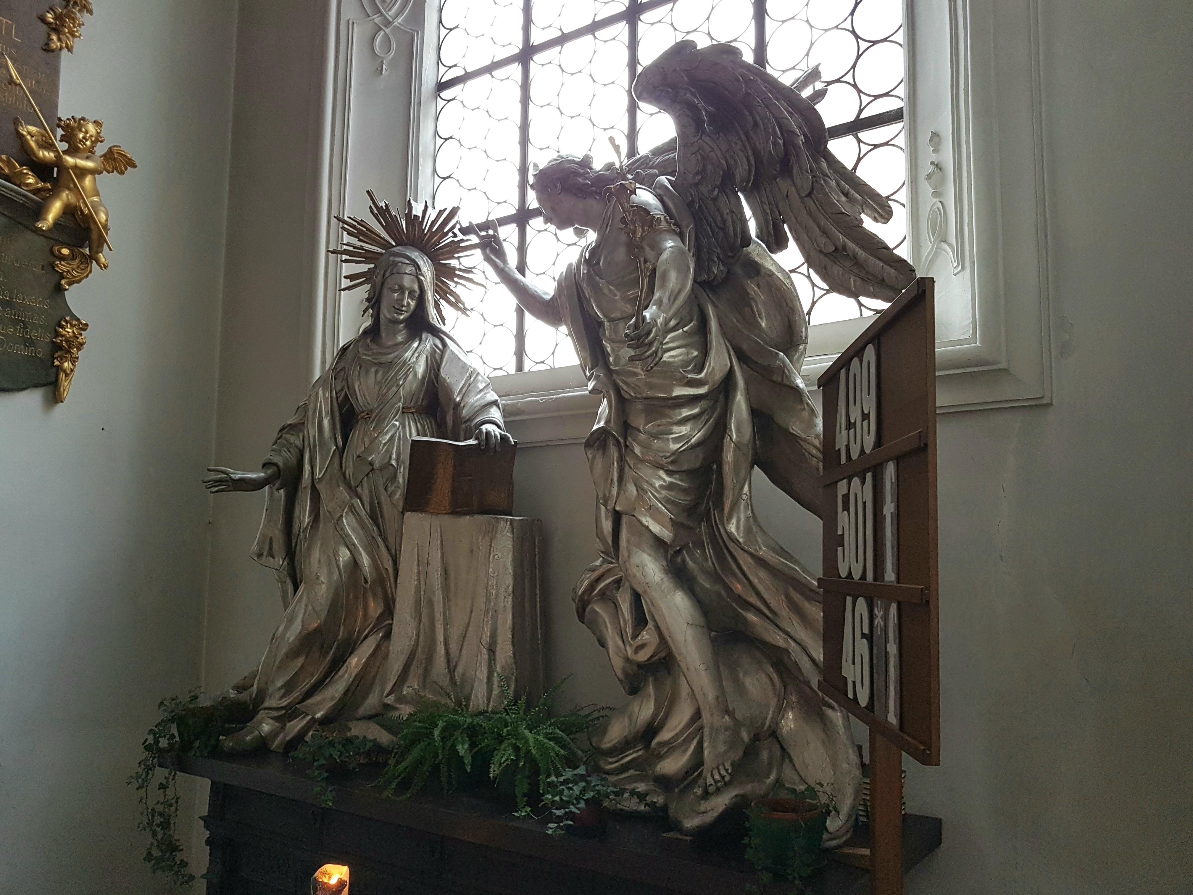 München-Altstadt, Peterskirche, lebensgroße Figurengruppe Verkündigung Maria rechts neben dem großen rechten Seitenschiff-Altar.